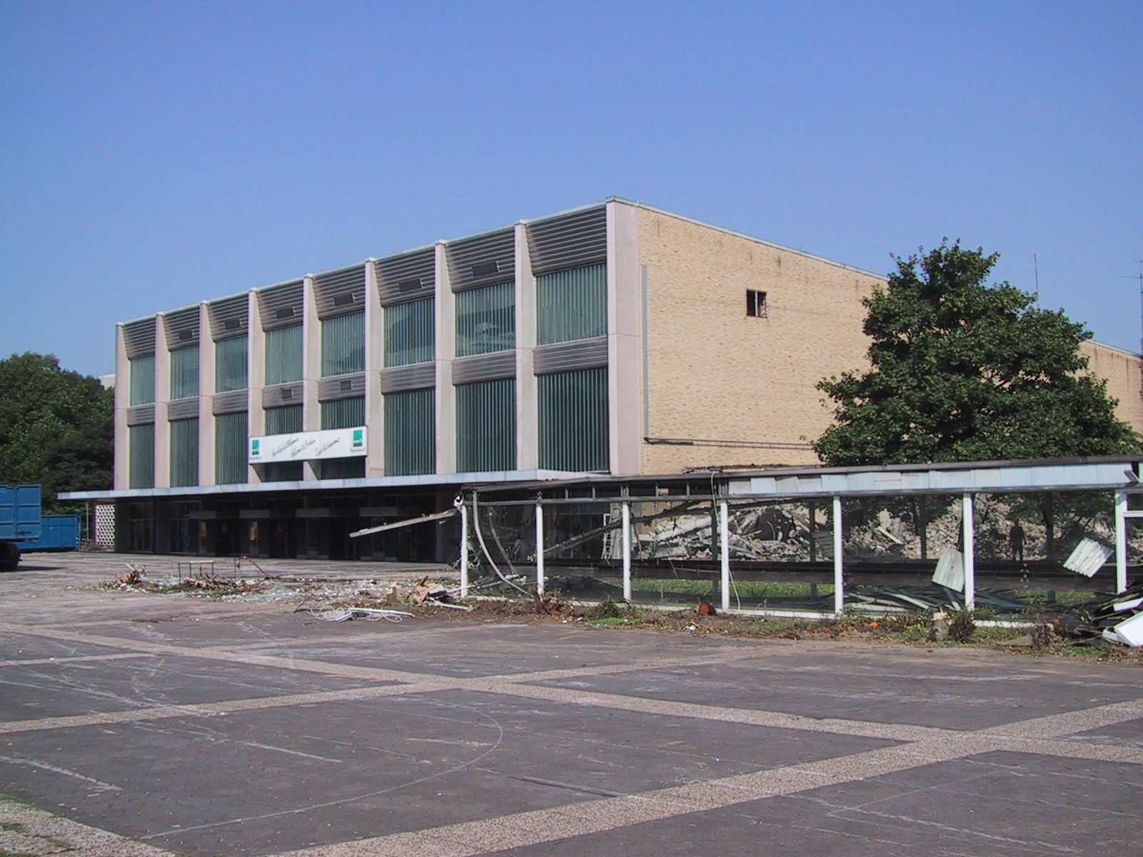 Die Veranstaltungshalle Ruhrlandhalle bei dem Beginn des Abriss Source: own work Date: August 2001, Bochum, Germany Author: Maschinenjunge Licence: GFDL, cc-by 3.0